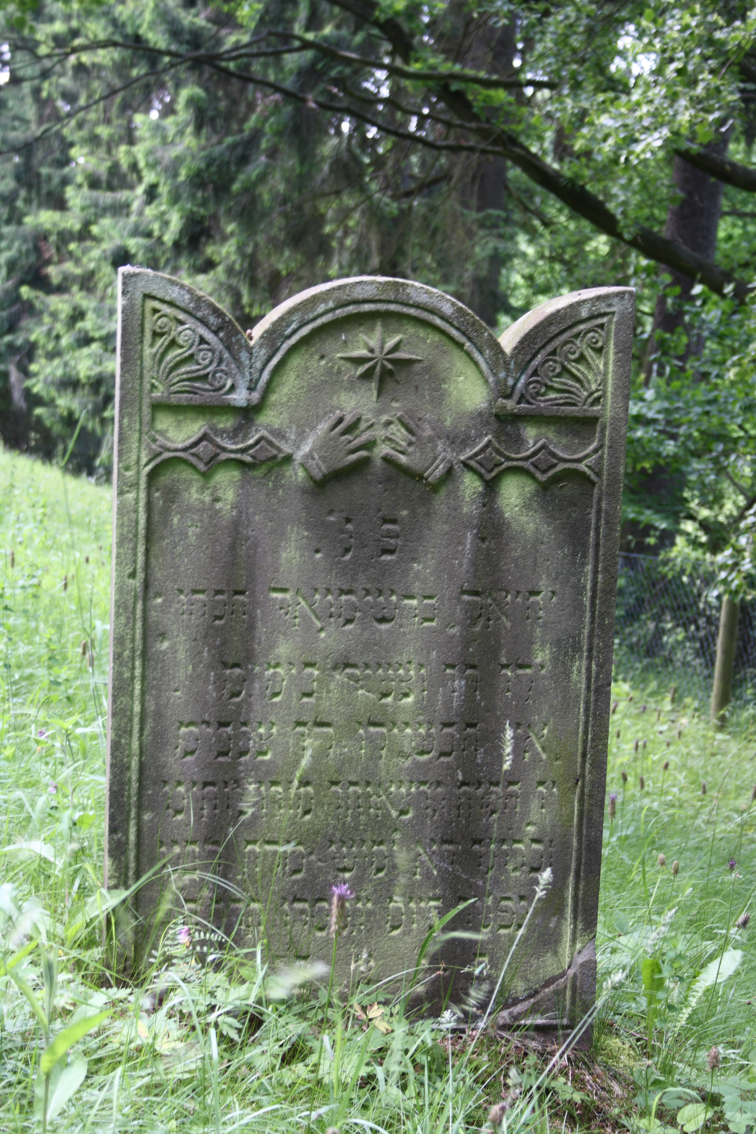 jüdischer Friedhof in Grebenau im Vogelsbergkreis (Hessen)